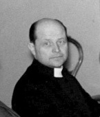 Domprost Olle Herrlin.